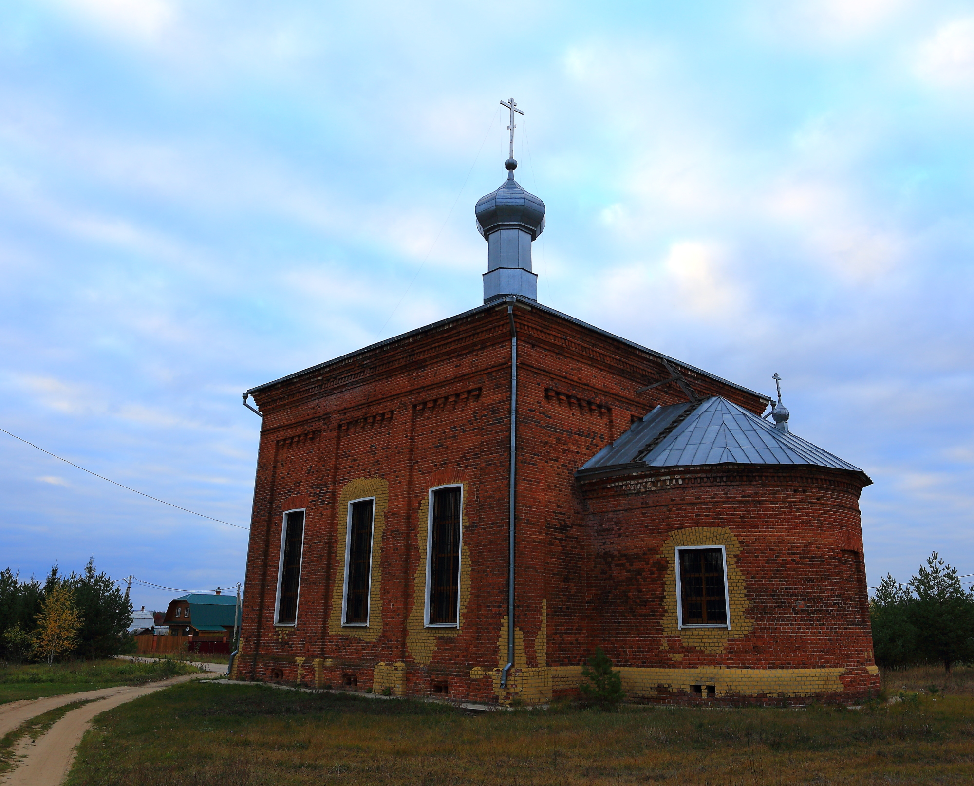 Церковь Рождества Христова (Москва и Московская область, Егорьевск, село Мальково)